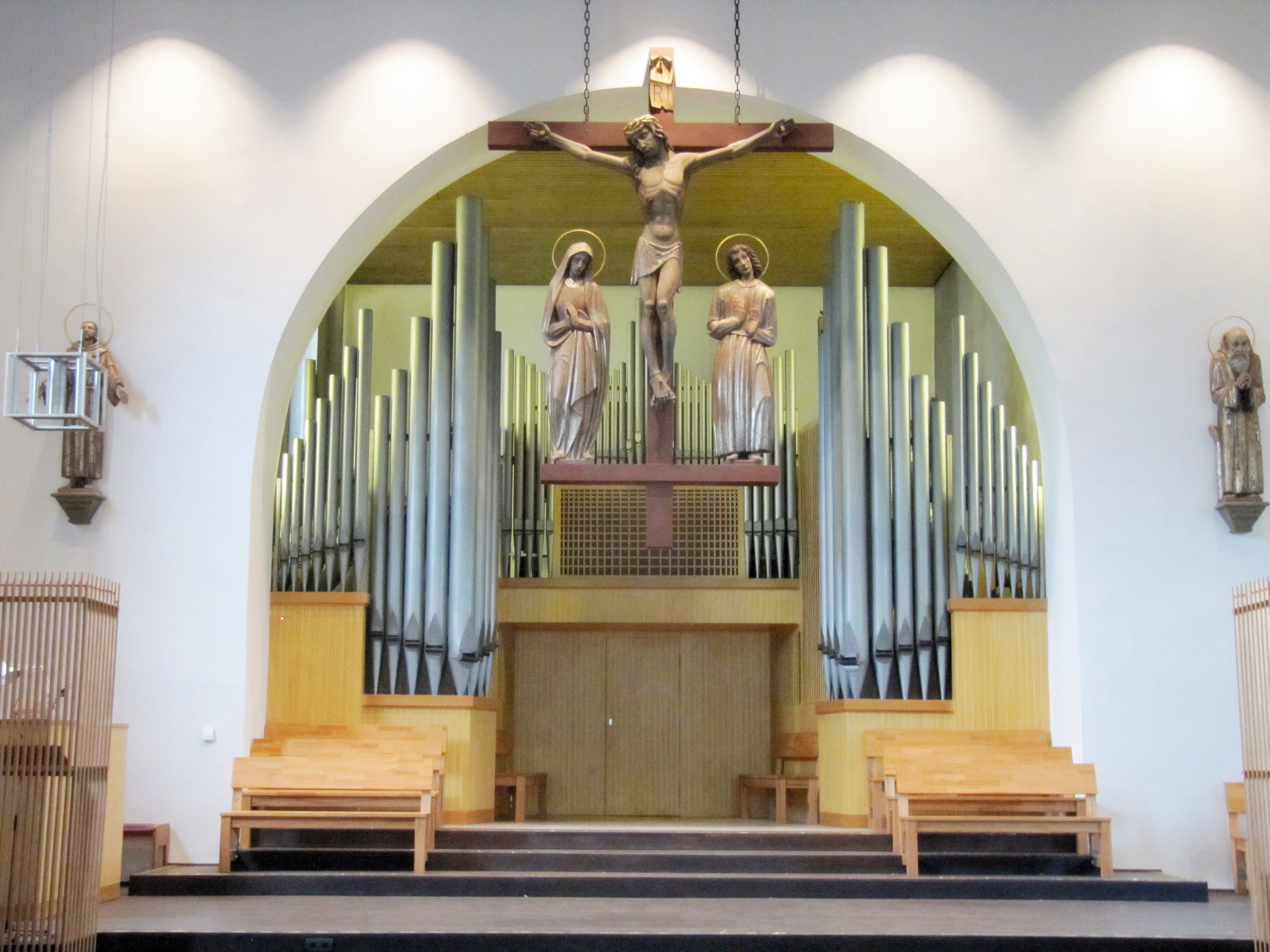 Orgel von St. Konrad in Regensburg